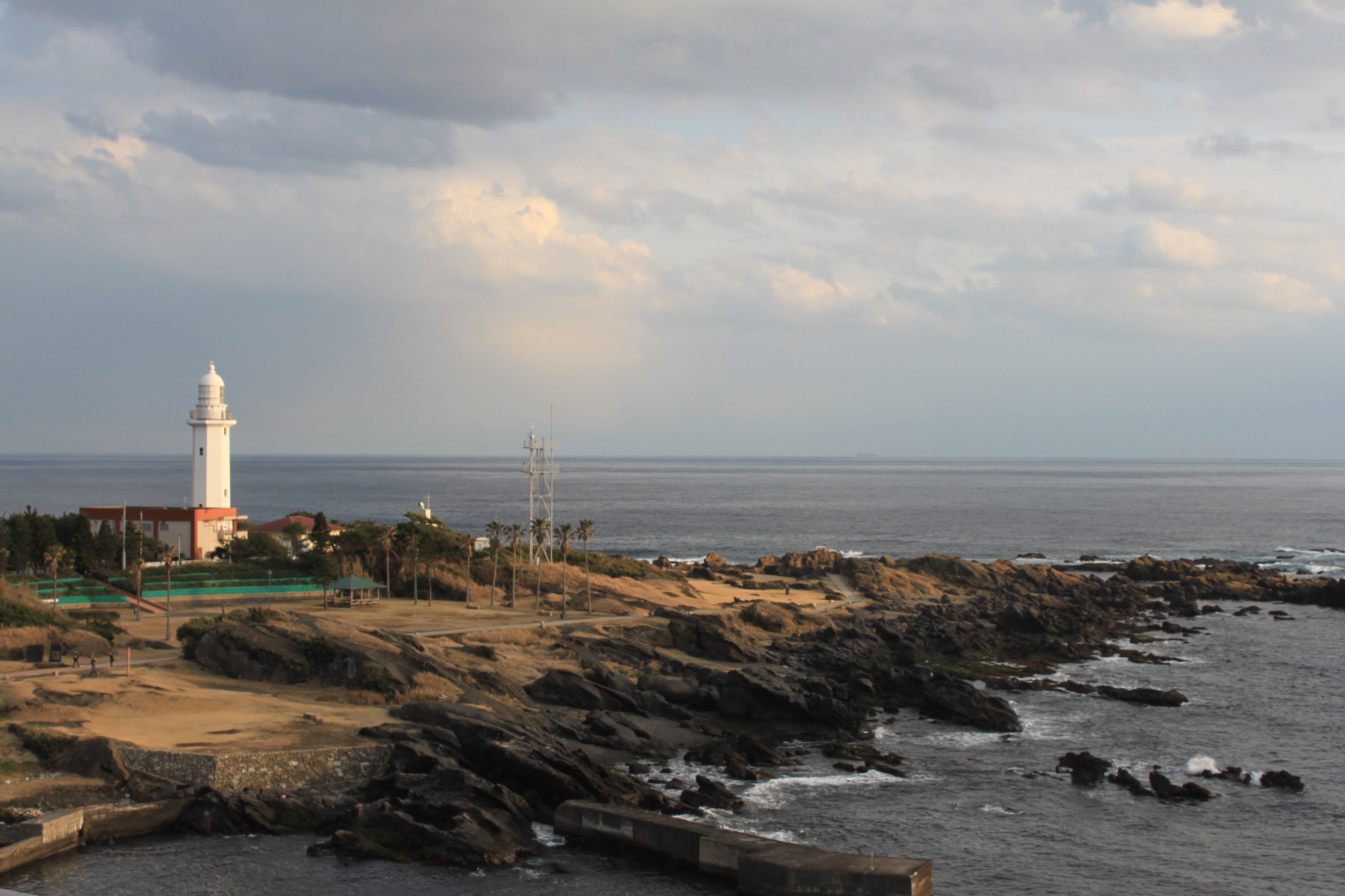 南海荘からの風景